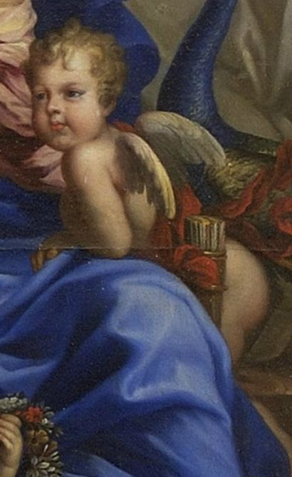 Filip Karol Burbon (1668-1671)